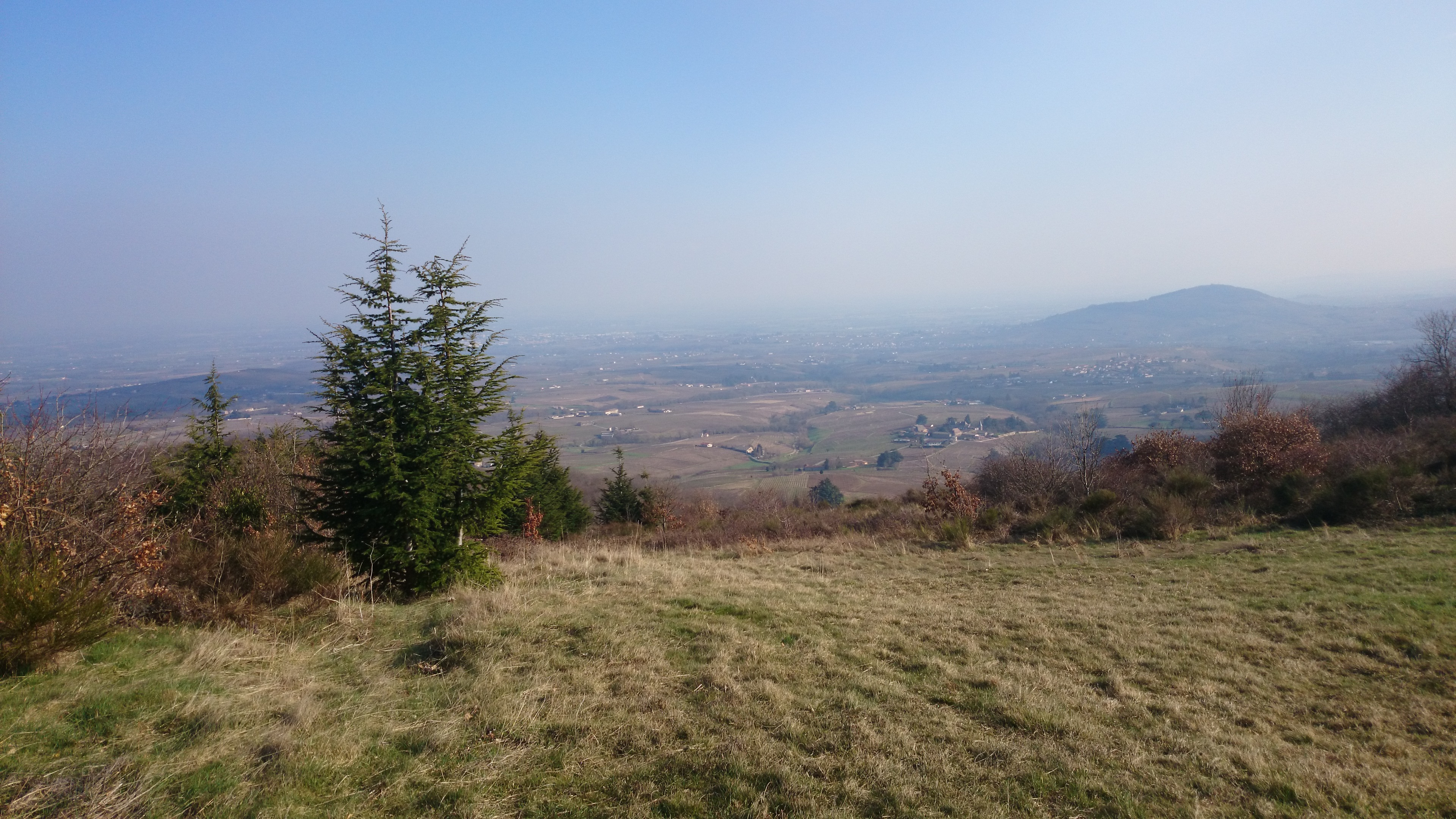 Photo pris aux lieu dit Les Grandes Terres à Lantignié